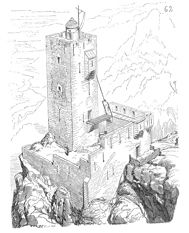 ... Le cours de nos fleuves, les passages des montagnes, certaines lignes de défense d'un territoire, laissent encore voir des traces de tours, carrées habituellement, qui servaient à assurer le péage sur les cours d'eau, à réprimer le brigandage, arrêter les invasions, les surprises de voisins trop puissants ou turbulents. Ces tours, que l'on trouve encore en grand nombre dans les passages des Pyrénées, le long de la haute Loire, du Rhône, de la Saône, de l'Aveyron et du Tarn, du Doubs et de l'Isère, sur les frontières du Morvan, dans les Vosges, sont plantées sur des points élevés et peuvent correspondre au moyen de signaux. L'assiette choisie est habituellement un promontoire escarpé ne se reliant aux hauteurs voisines que par une langue de terre, de manière à n'être accessible que vers un point. Cette chaussée naturelle est parfois coupée par un fossé ou défendue par un rempart qui sert de chemise à la tour. On ne peut pénétrer dans l'intérieur de celle-ci que par une porte relevée au-dessus du sol et par une échelle ou par un pont volant jeté sur le chemin de ronde de la chemise. Un exemple type fera comprendre cette disposition adoptée fréquemment dans les passages des Pyrénées (fig. 62) ...